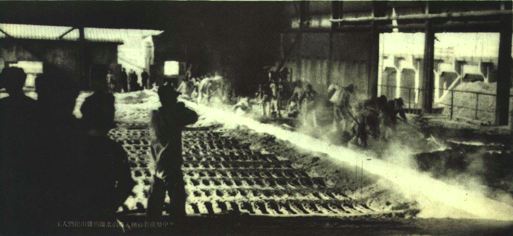 1950年的石景山钢铁厂，1950年7月的《人民画报》。